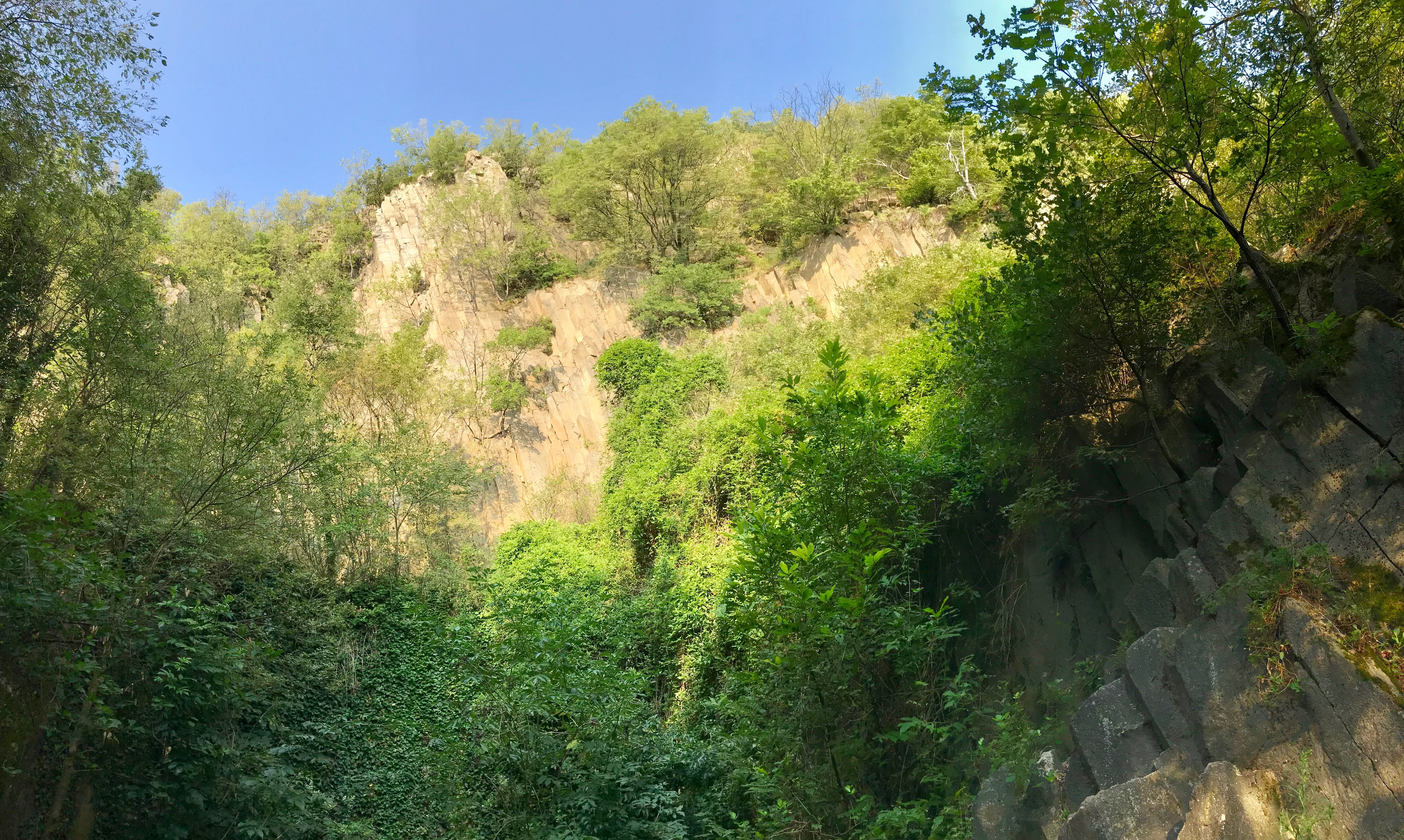 Questa è una foto della cava dismessa di riolite colonnare nel Monte Cinto, nei Colli Euganei. Scattata in estate.